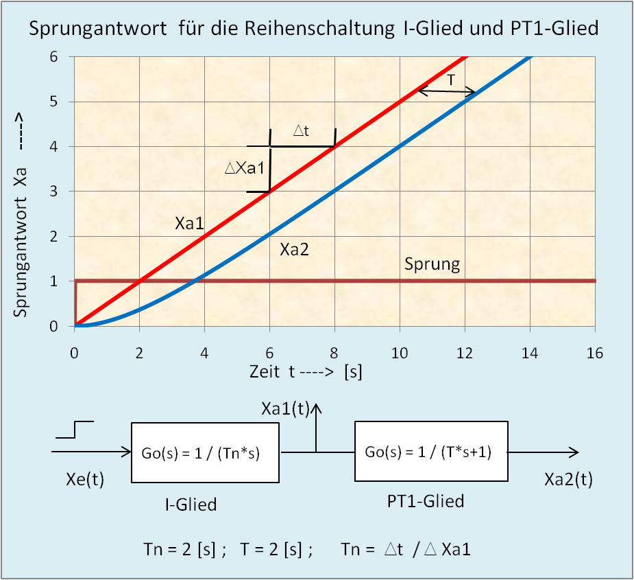 Sprungantwort von einer Regelstrecke mit I-Glied und T1-Glied